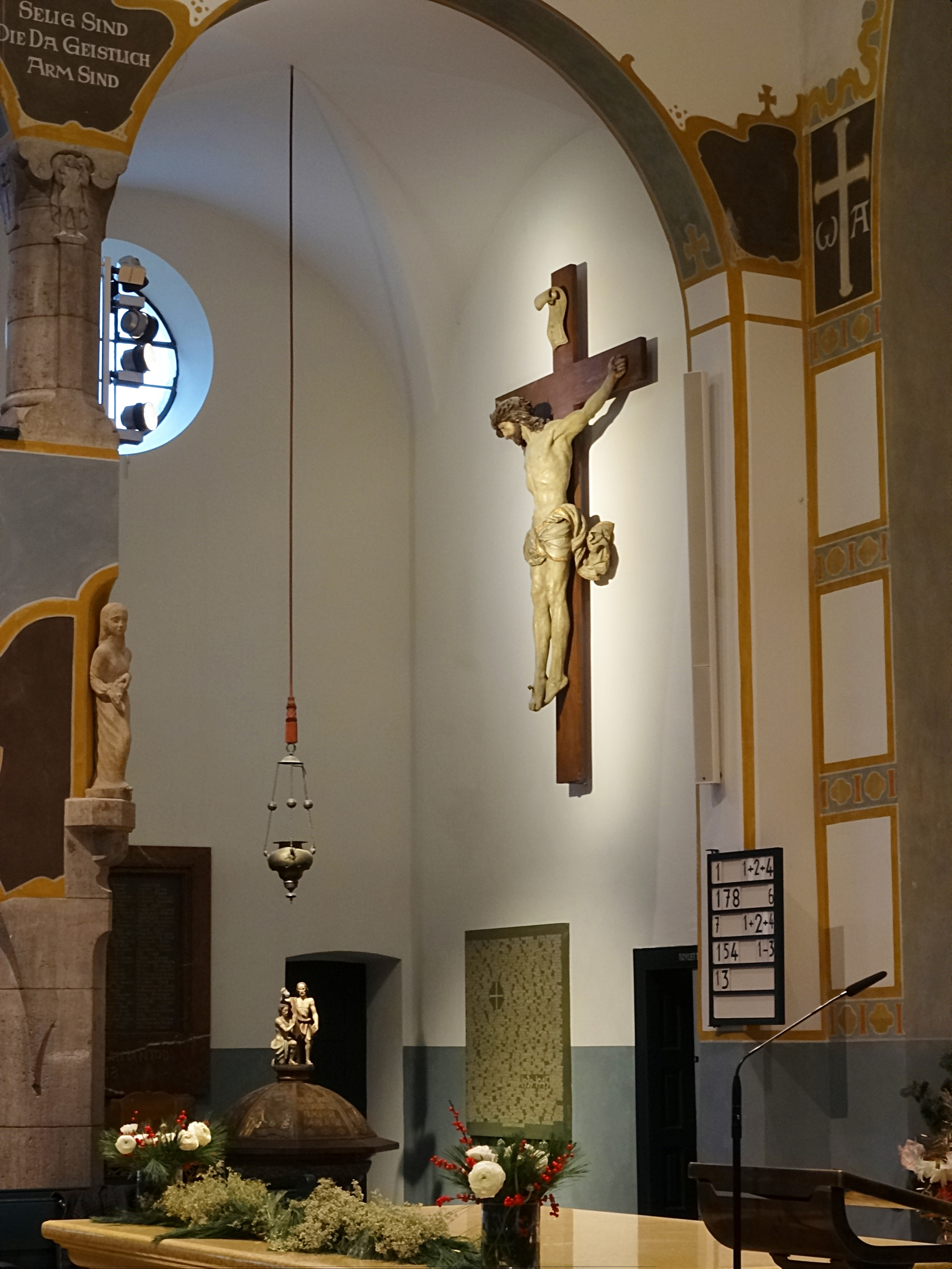 Erlöserkirche München, Taufbecken und Kreuz